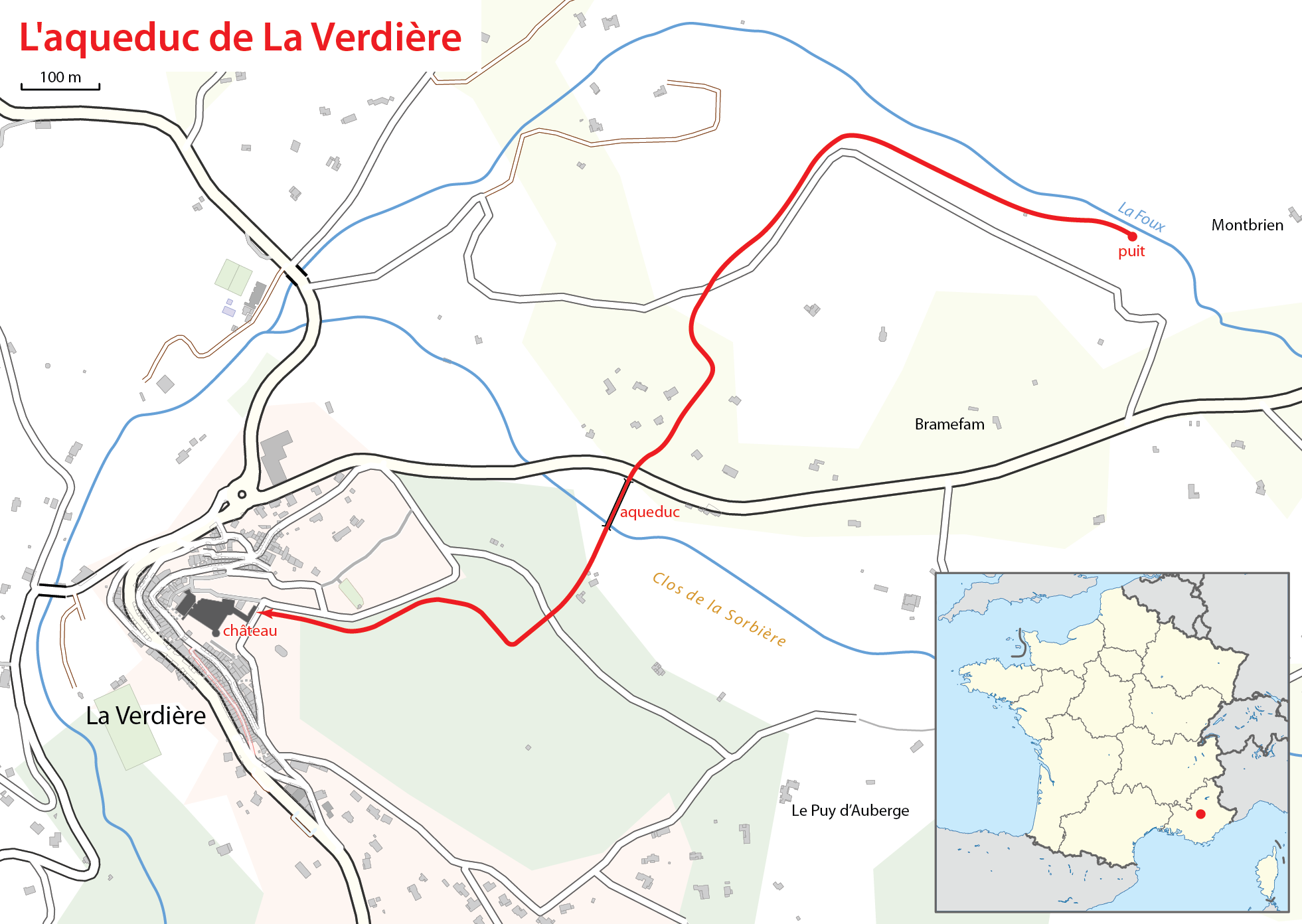 Karte: Das Aquedukt von La Verdière